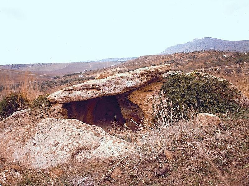 Dolmen situato a Sciacca (AG), Italia. Immagine by Salvo Piccolo